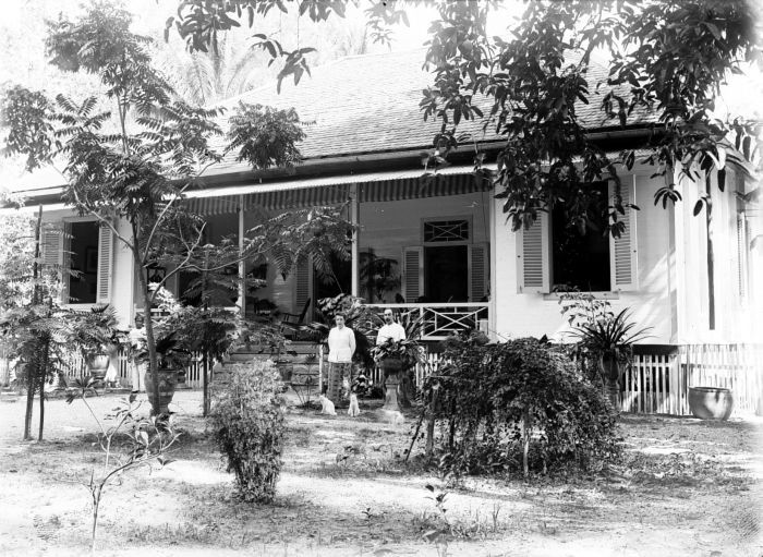 Negatief. Blijkens de volkstelling van 1920 woonden er 2.725 Europeanen in Borneo's Zuider- en Oosterafdeling. In Borneo's Westerafdeling waren dat er maar 839. Dat was dus zowel een zeer gering aantal als we kijken naar de totale bevolking van 'Nederlands' Borneo (ca. 1.625.000), als een klein percentage van de totale Europese bevolking van Nederlands-Indië (ca. 170.000) De VOC had er tot ca. 1750 weinig activiteiten ontplooid en ook daarna bleef de omvang van de handel met Borneo beperkt. Dat veranderde pas toen Engelse avonturiers, onder wie de beroemde James Brooke, rond 1840 belangstelling voor Borneo kregen. Het Nederlandse bedrijfsleven kwam pas rond 1880 in actie. (P. Boomgaard, 2001). Europeanen met katten voor hun huis in Bandjermasin